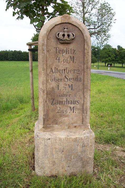 KSM Ganzmeilenstein Hermsdorf/Erzg. (Buschhaus)